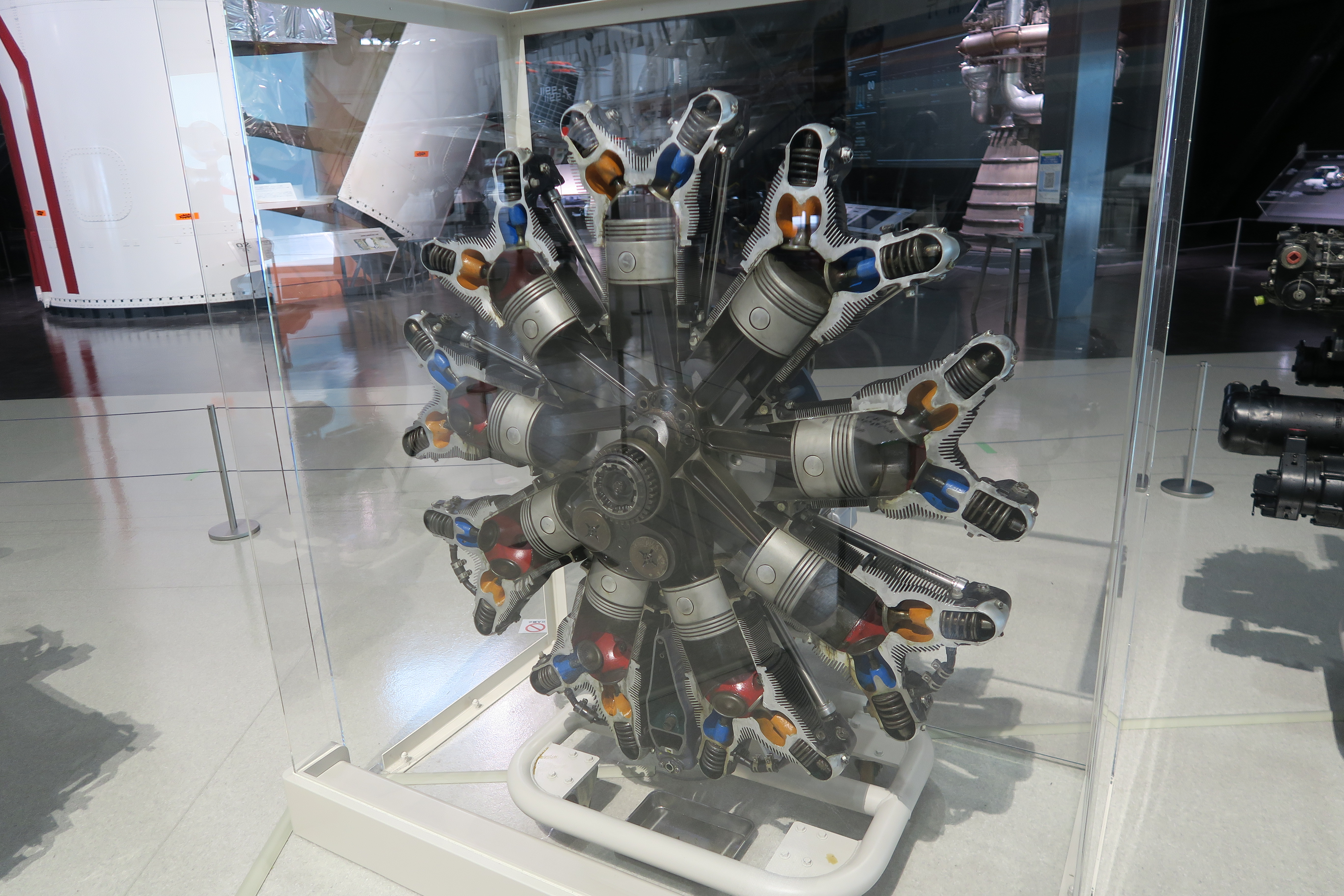 R-1340-AN-1 レシプロエンジン、米国プラットアンドホイットニー社、空冷星形9気筒